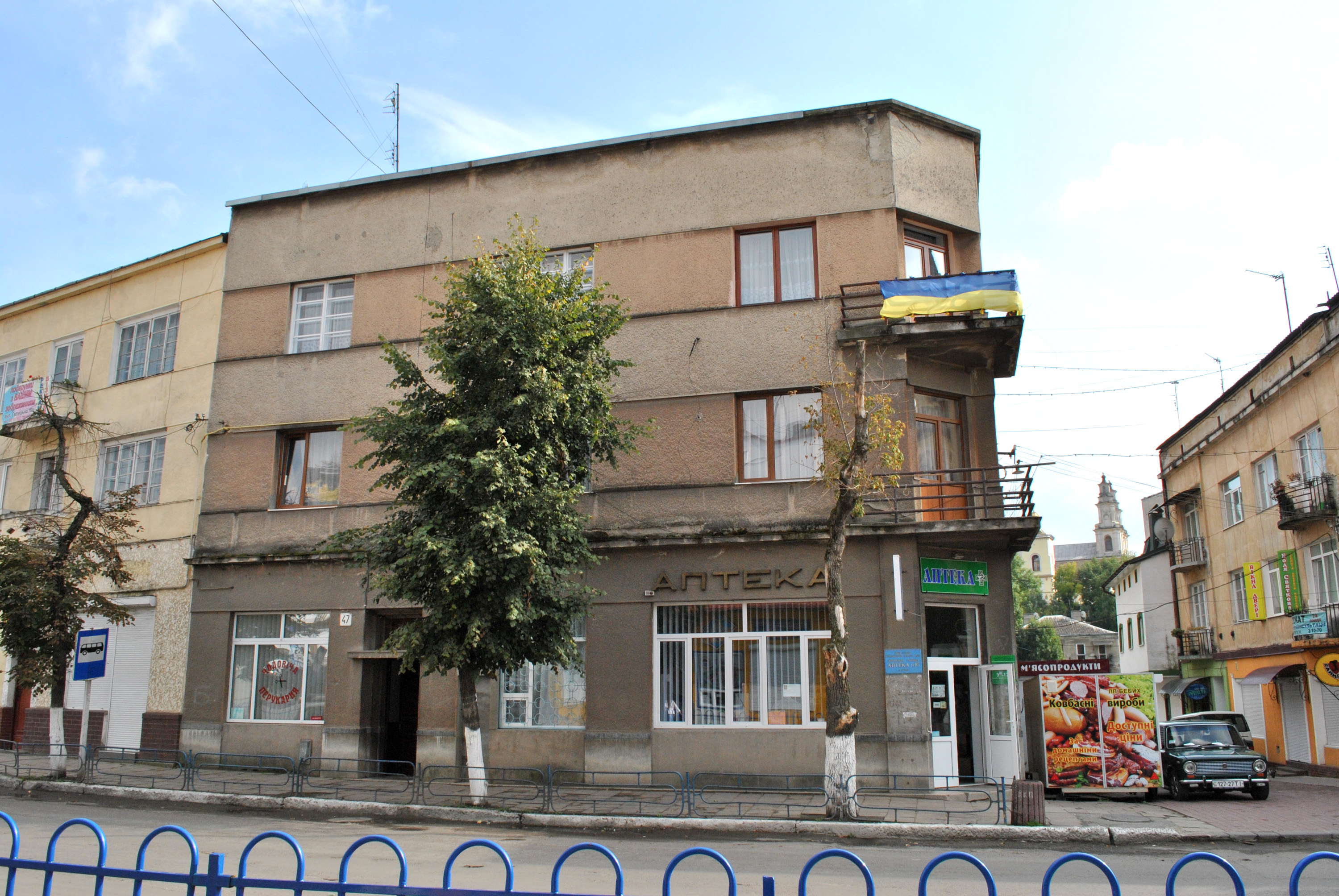 Аптека (мур.), Бучач, вул. Галицька, 47